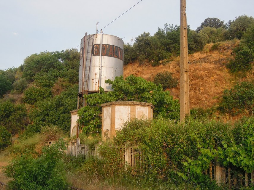 Ehemaliger Bahnhof von Barca d'Alva, Portugal